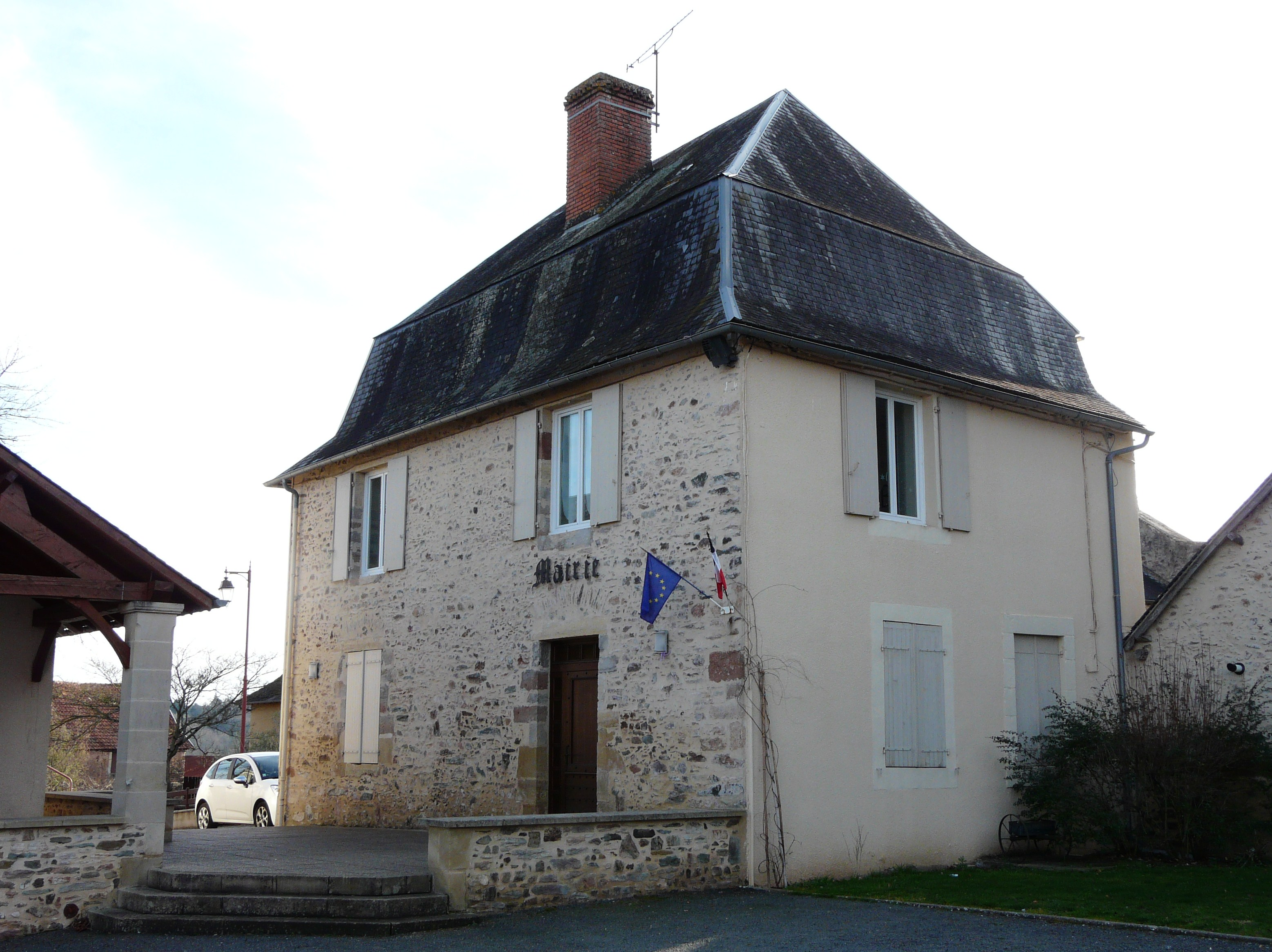 La mairie de Salagnac, Dordogne, France.